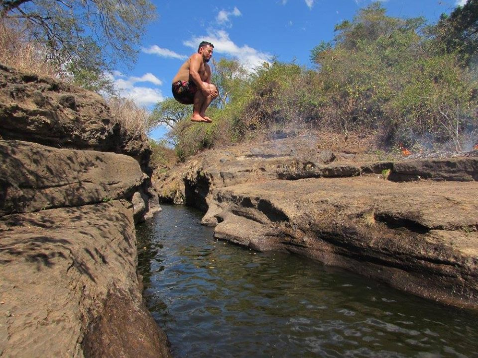 Recurso Natural